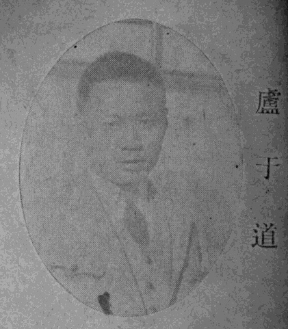 中文（台灣）: 民國名人圖鑑肖像